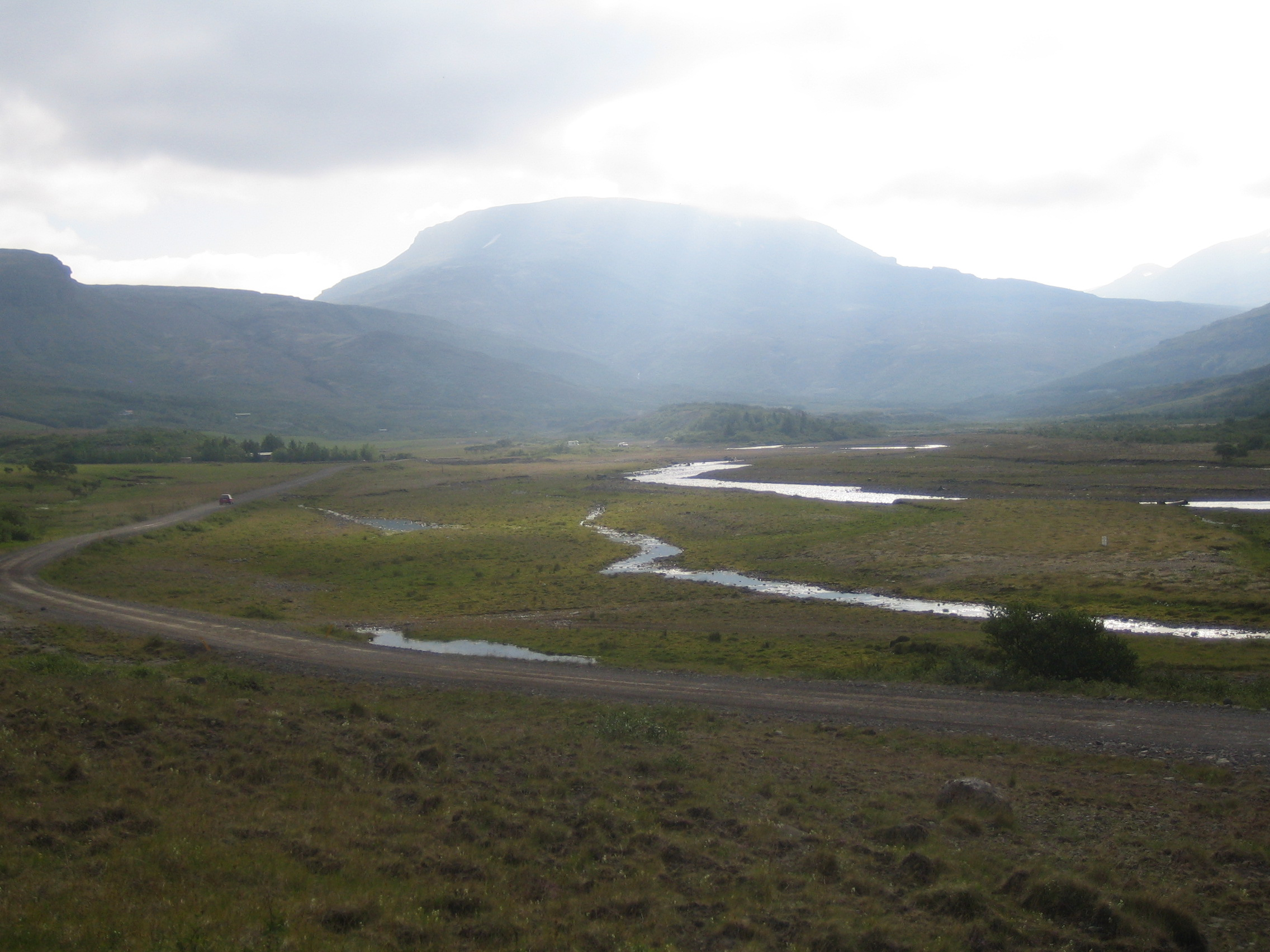 Hvalfjörður séður frá Botnsskála